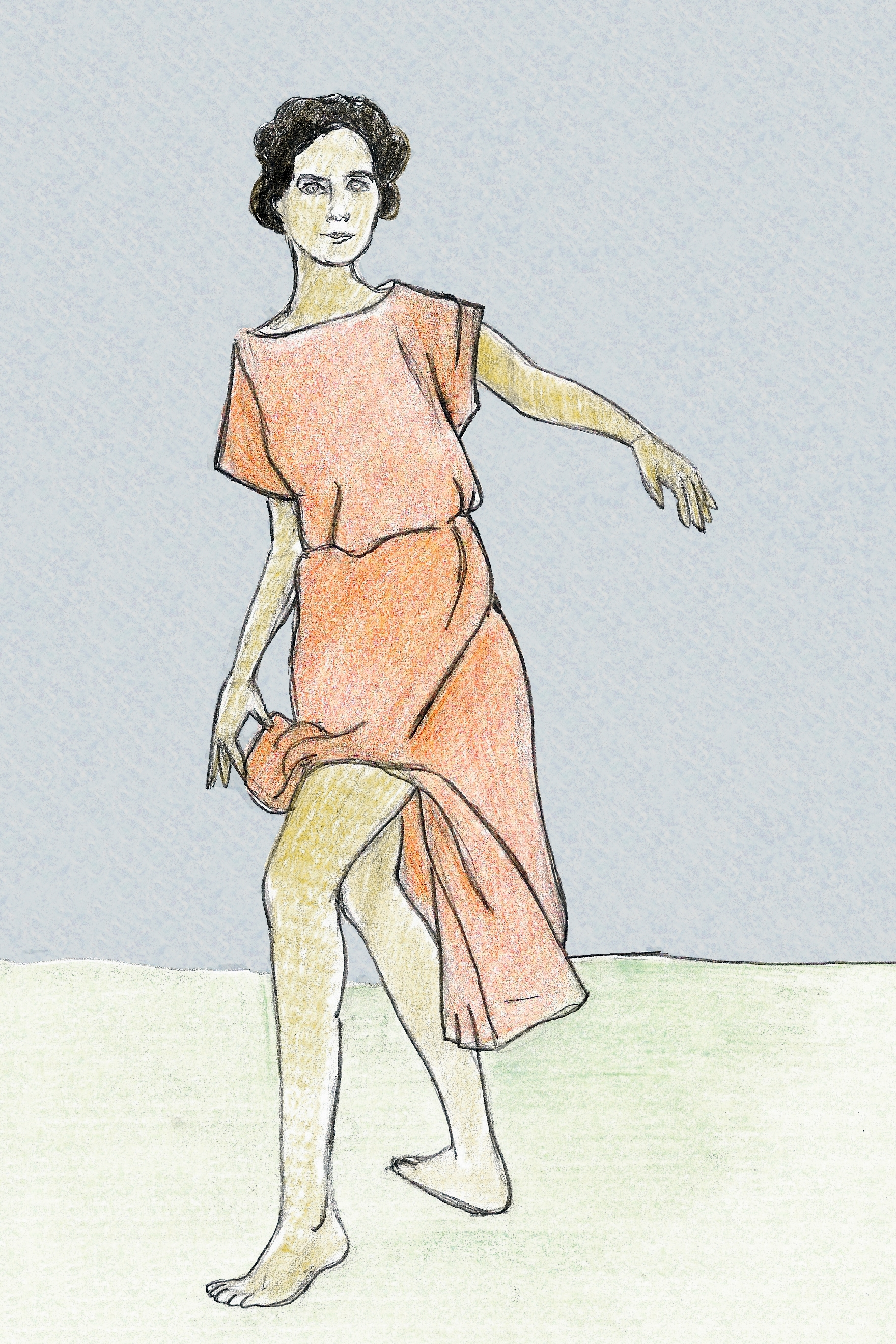 Tänzerin Katja Wulff auf einer eigenen künstlerischen Interpretation (basierend auf den beiden historischen Fotos auf )